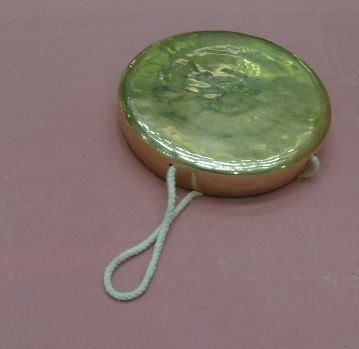 A kwaenggwari, a small gong, at an exhibit at Busan Station, Busan, South Korea